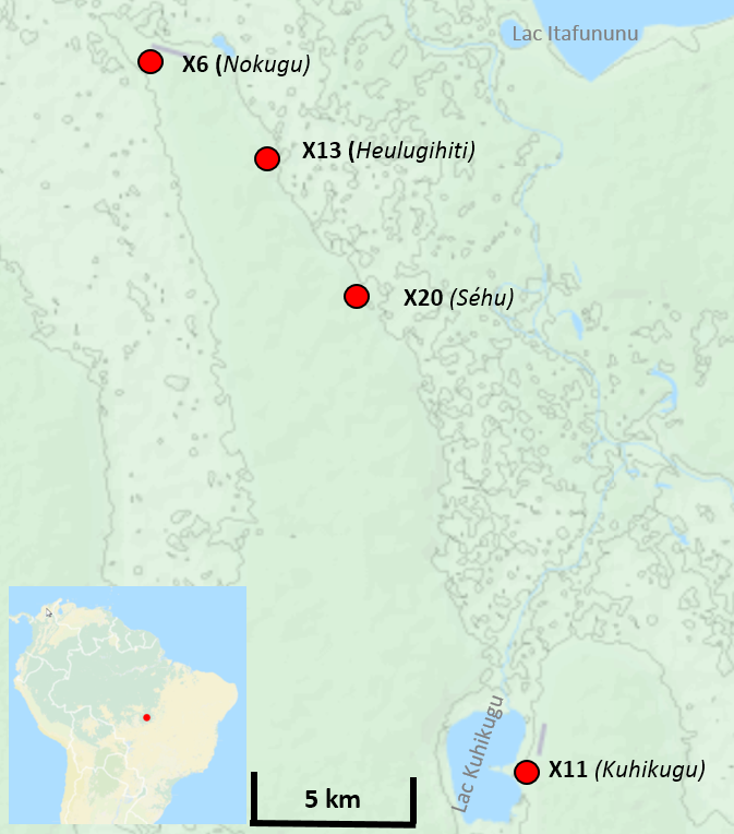 Complexe archéologique de Kuhikugu